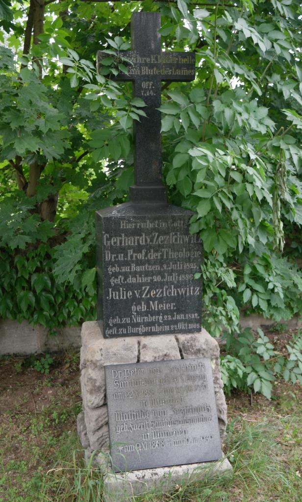 Grab des Theologen Gerhard von Zezschwitz, 1825-1886, auf dem Neustädter Friedhof in Erlangen